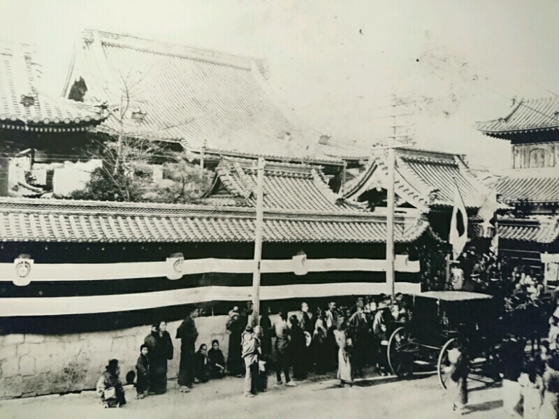 旧善福寺の外観